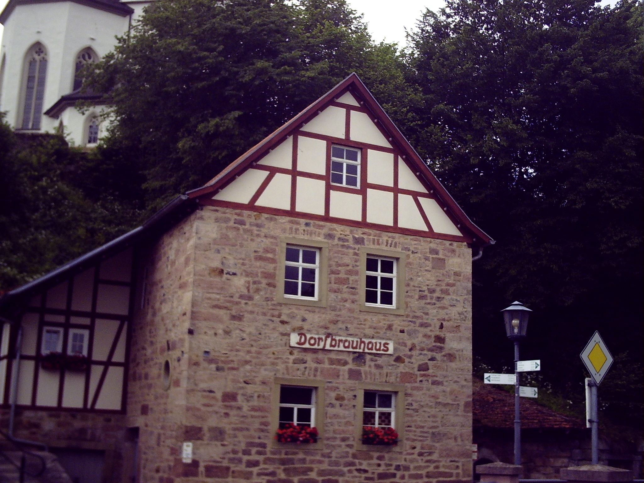 Brauhaus Schönau an der Brend